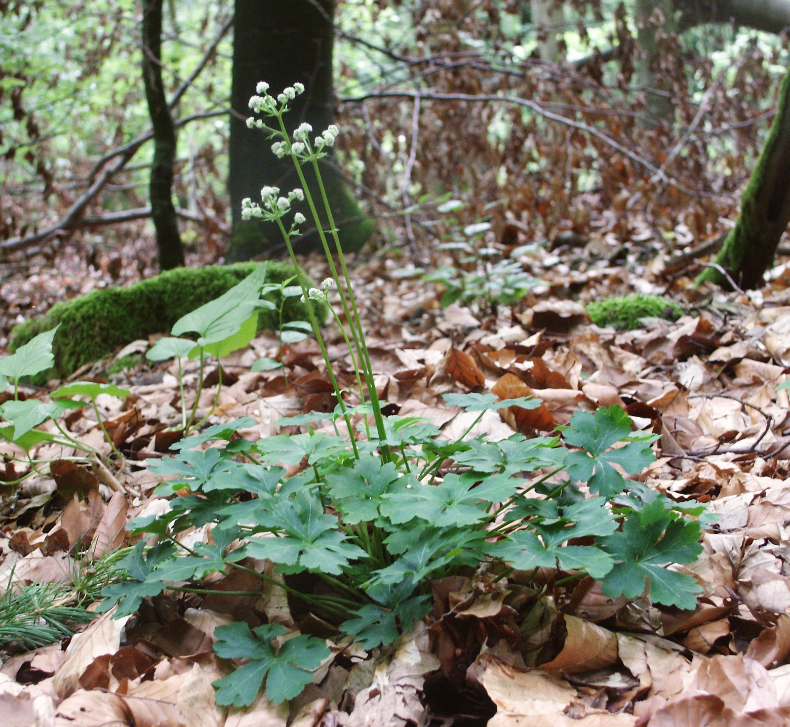 Sanicula europaea, Taubergrund, Germany